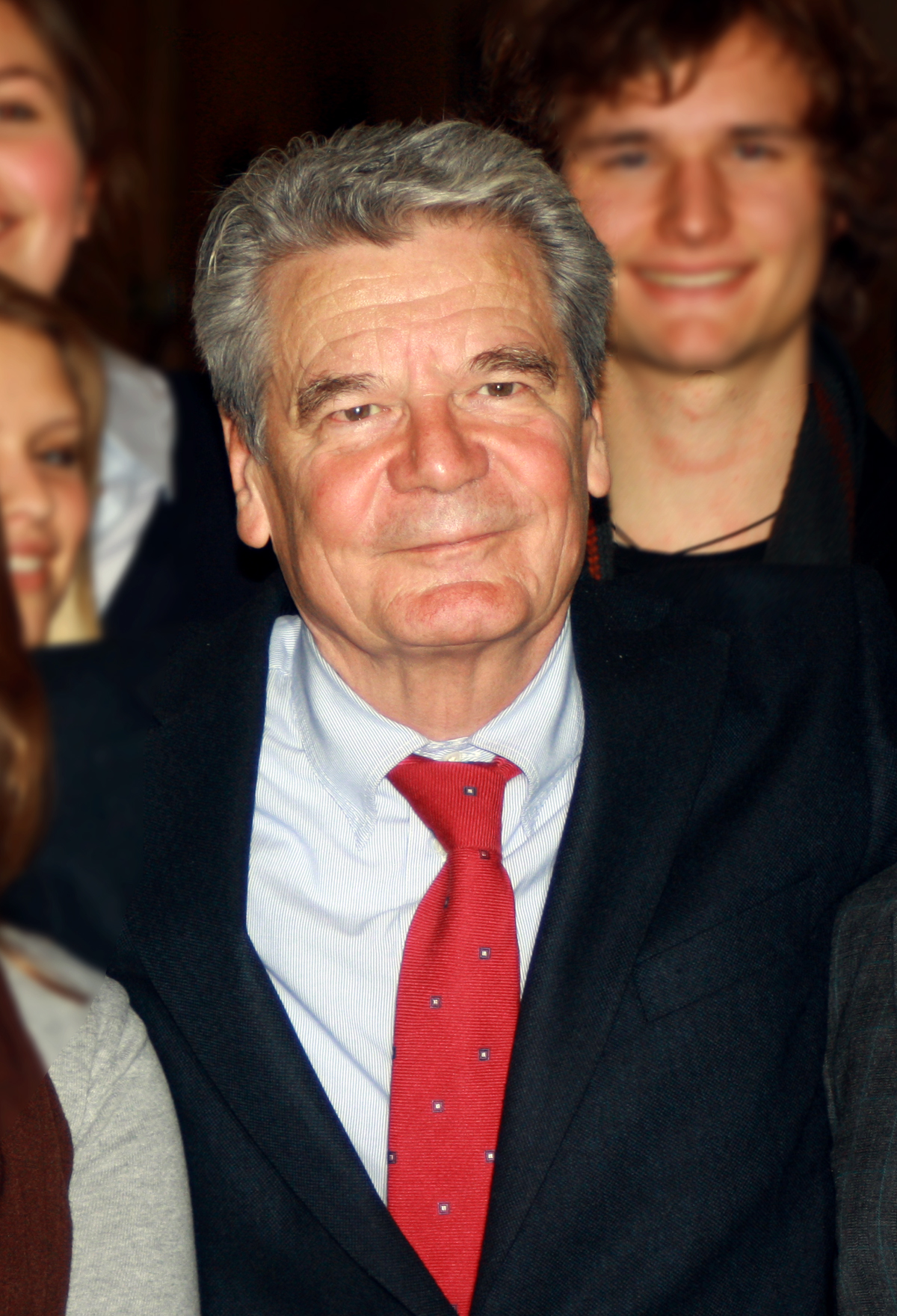 Joachim Gauck, deutscher evangelischer Pastor, kandidierte im Jahr 2010 erfolglos für das Amt des Präsidenten der Bundesrepublik Deutschland. Hier am 29.11.2010 in München.